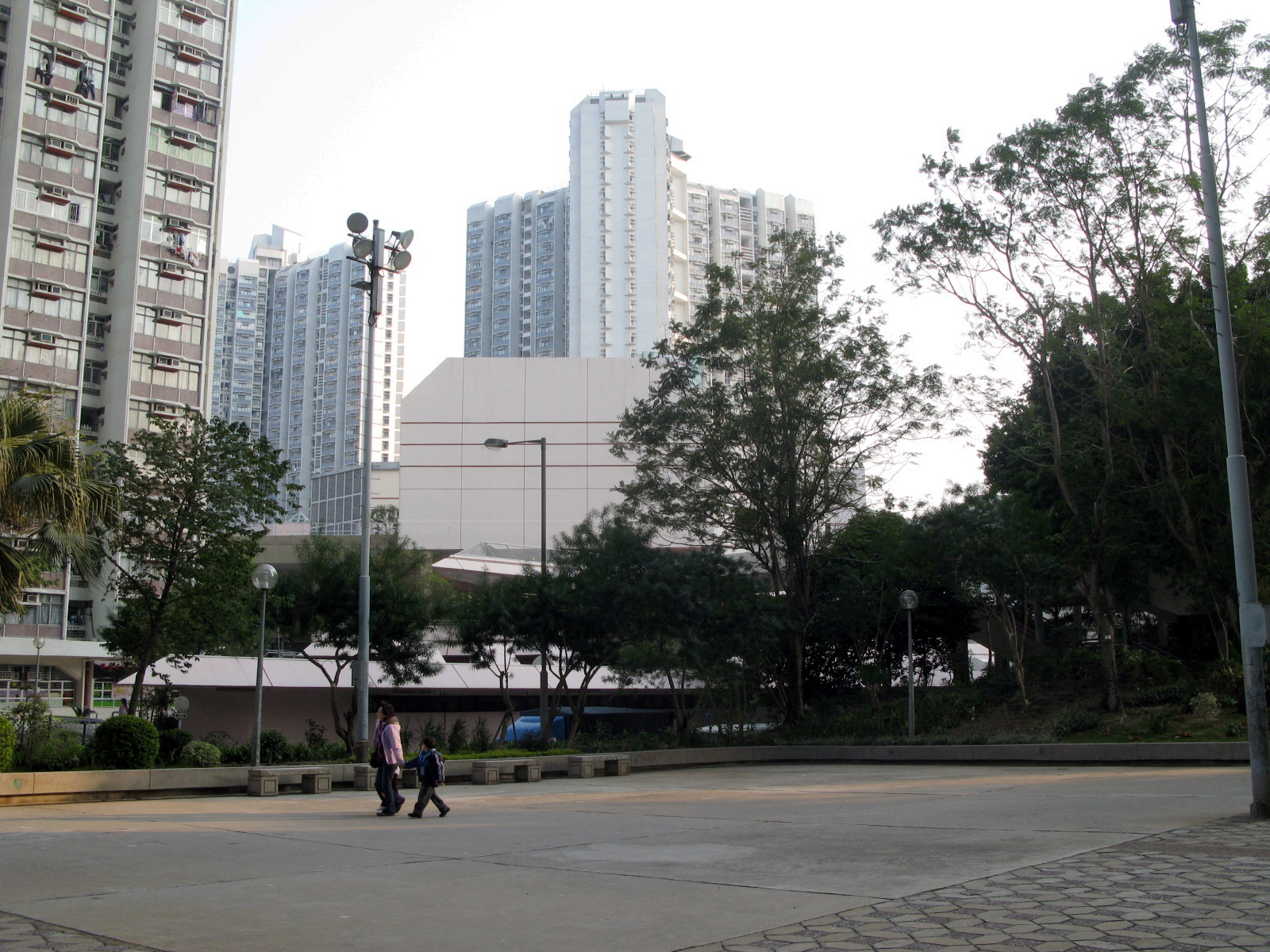 HK Hang On Estate Small Plaza